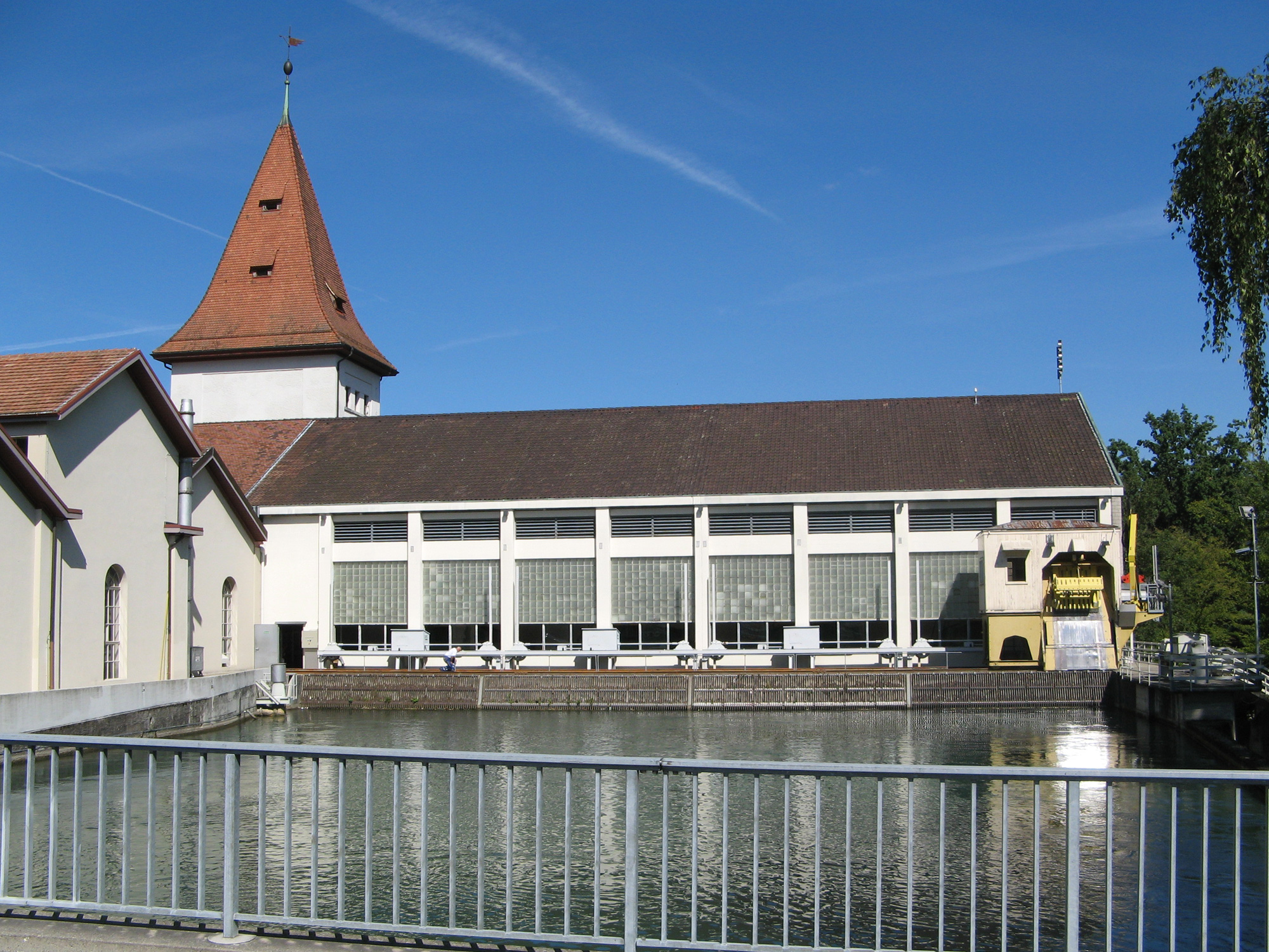 Kraftwerk Aarau (IBA)